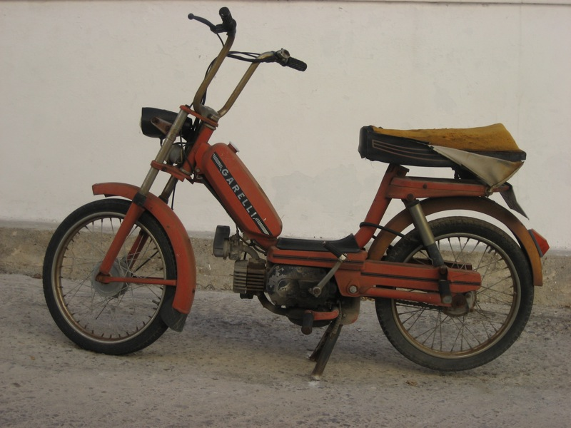 Garelli Moped